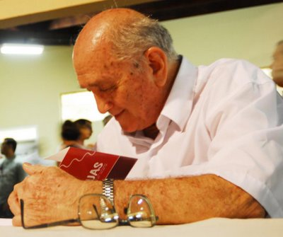 Foto do poeta Osvaldo Chaves